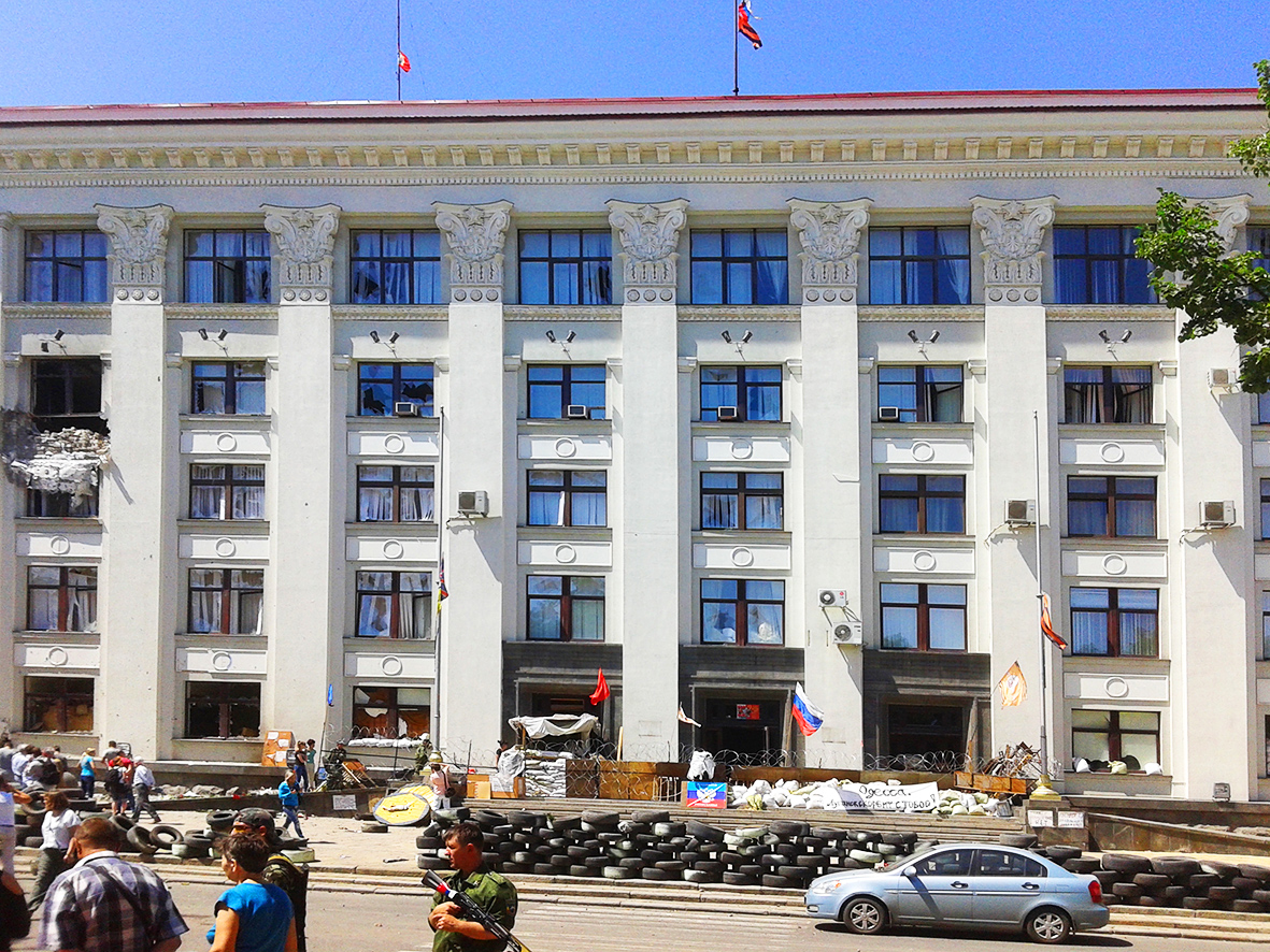 Луганська ОДА після нанесення удару по будівлі